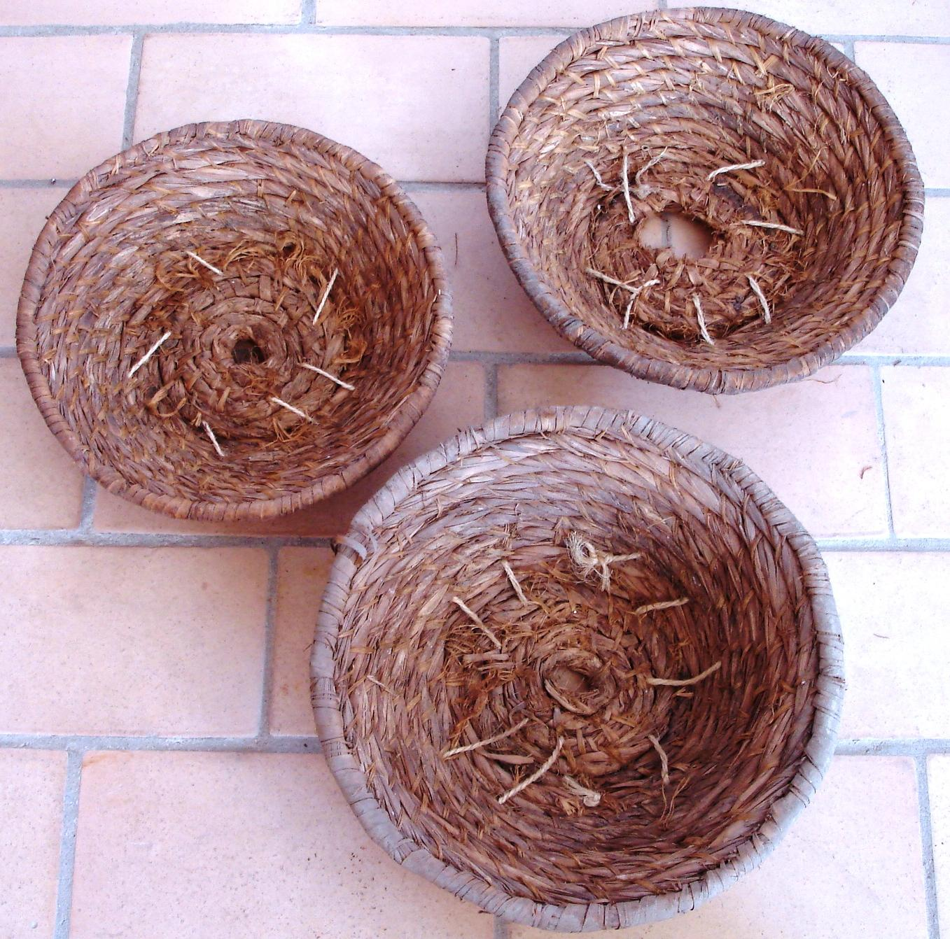 Pallissó